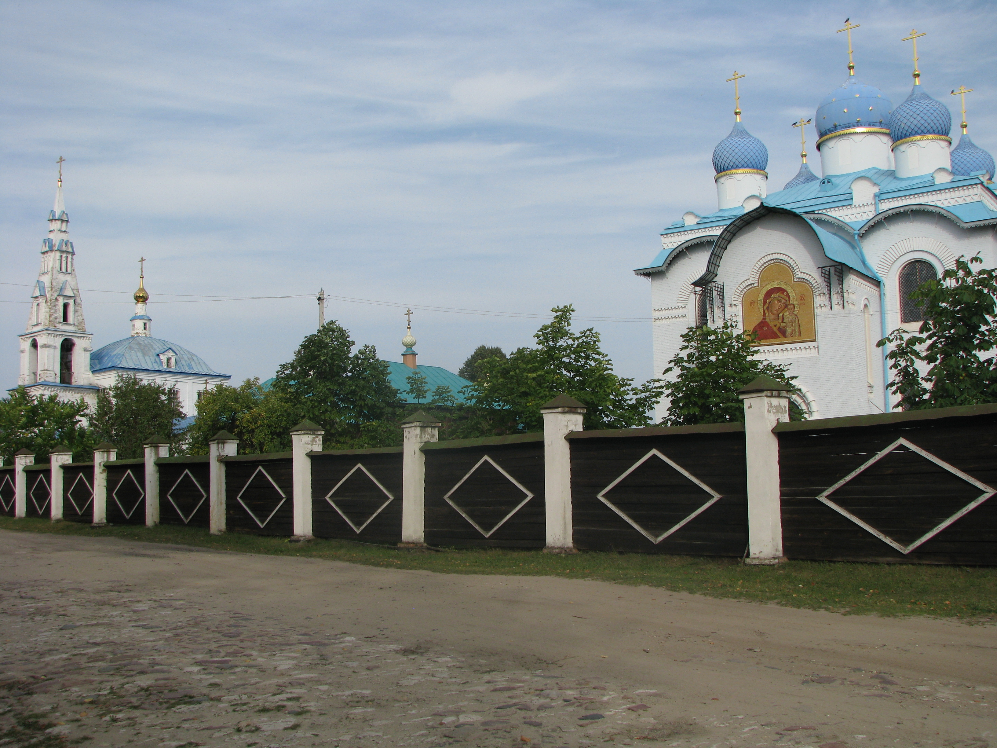 Монастырь Святоезерская Иверская пустынь: Мугреевский, Южский район, Ивановская область